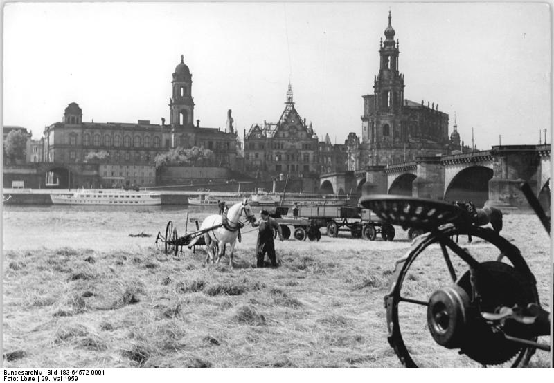 Dresden, Elbwiese, Brühlsche Terrasse, Hofkirche Zentralbild Löwe 29.5.1959 Heumahd auf den Elbewiesen. Auf den Elbewiesen in Dresden wird z. Zt. das Gras gemäht. Im Hintergrund die Brühl´sche Terrasse und die katholische Hofkirche.